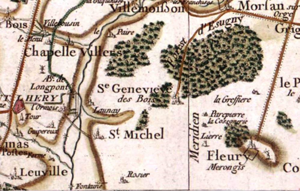 Carte de la région de Sainte-Geneviève-des-Bois (91) au XVIIIe siècle par Cassini.